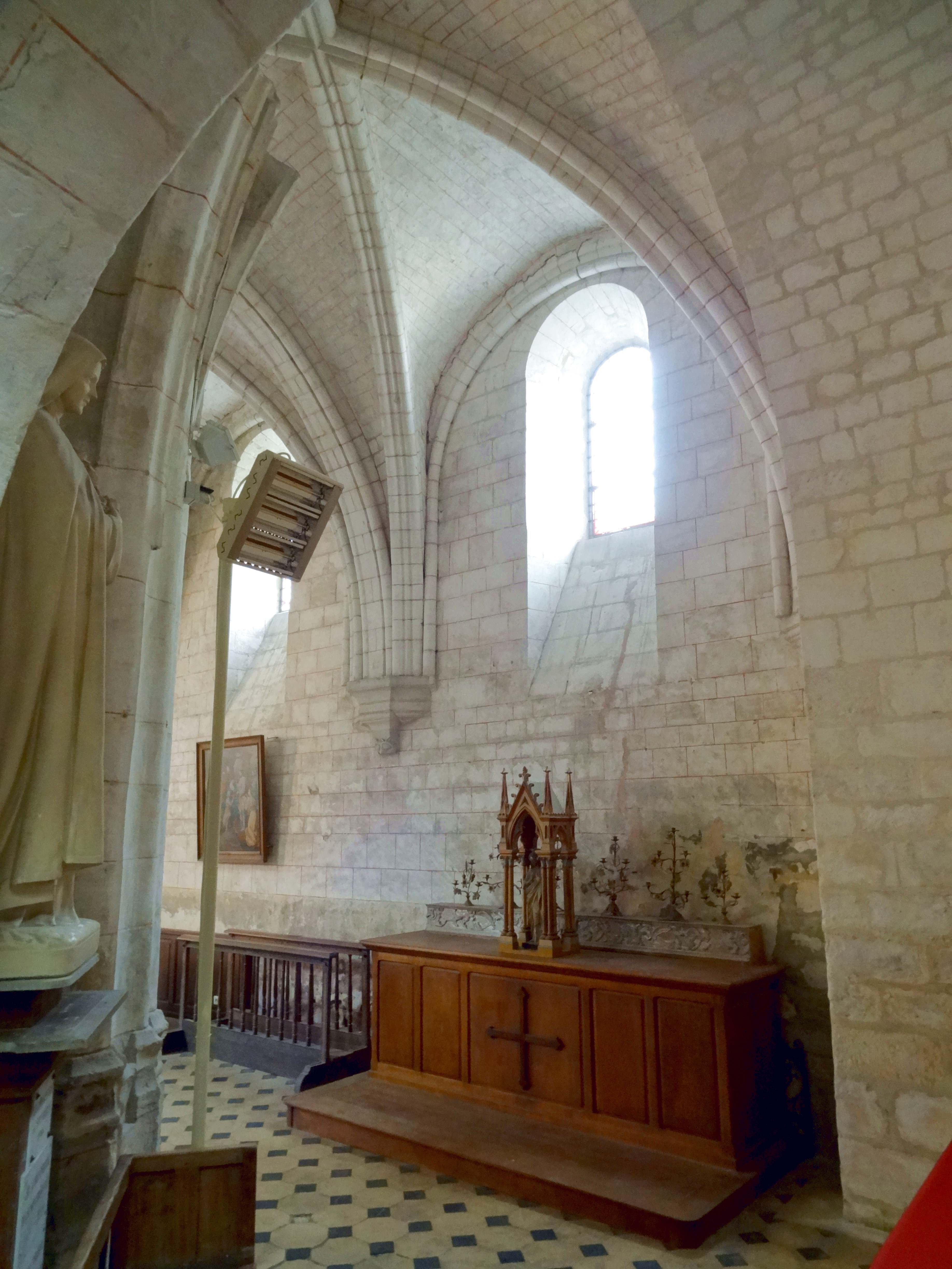 Intérieur de l'église - voir titre.